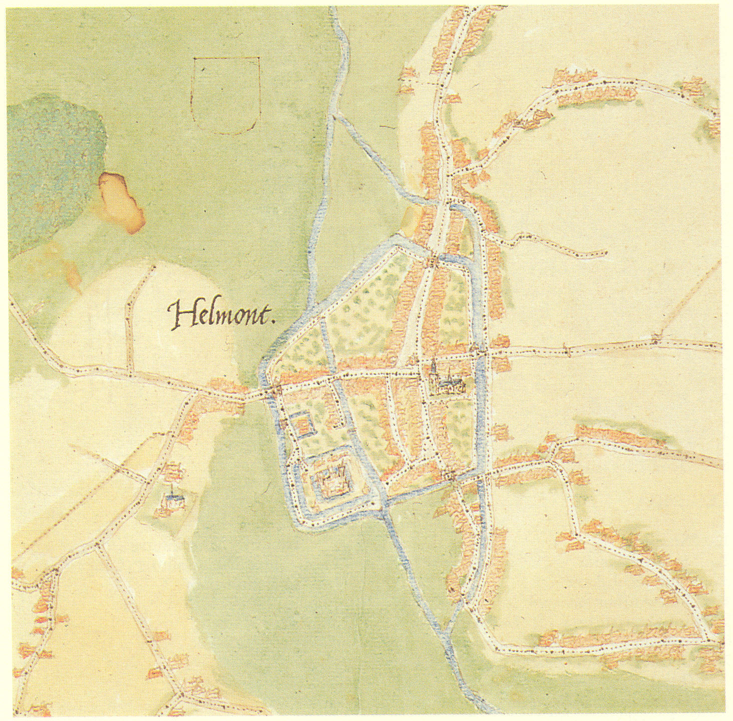 Net tekening van Jacob van Deventer van de stad Helmond